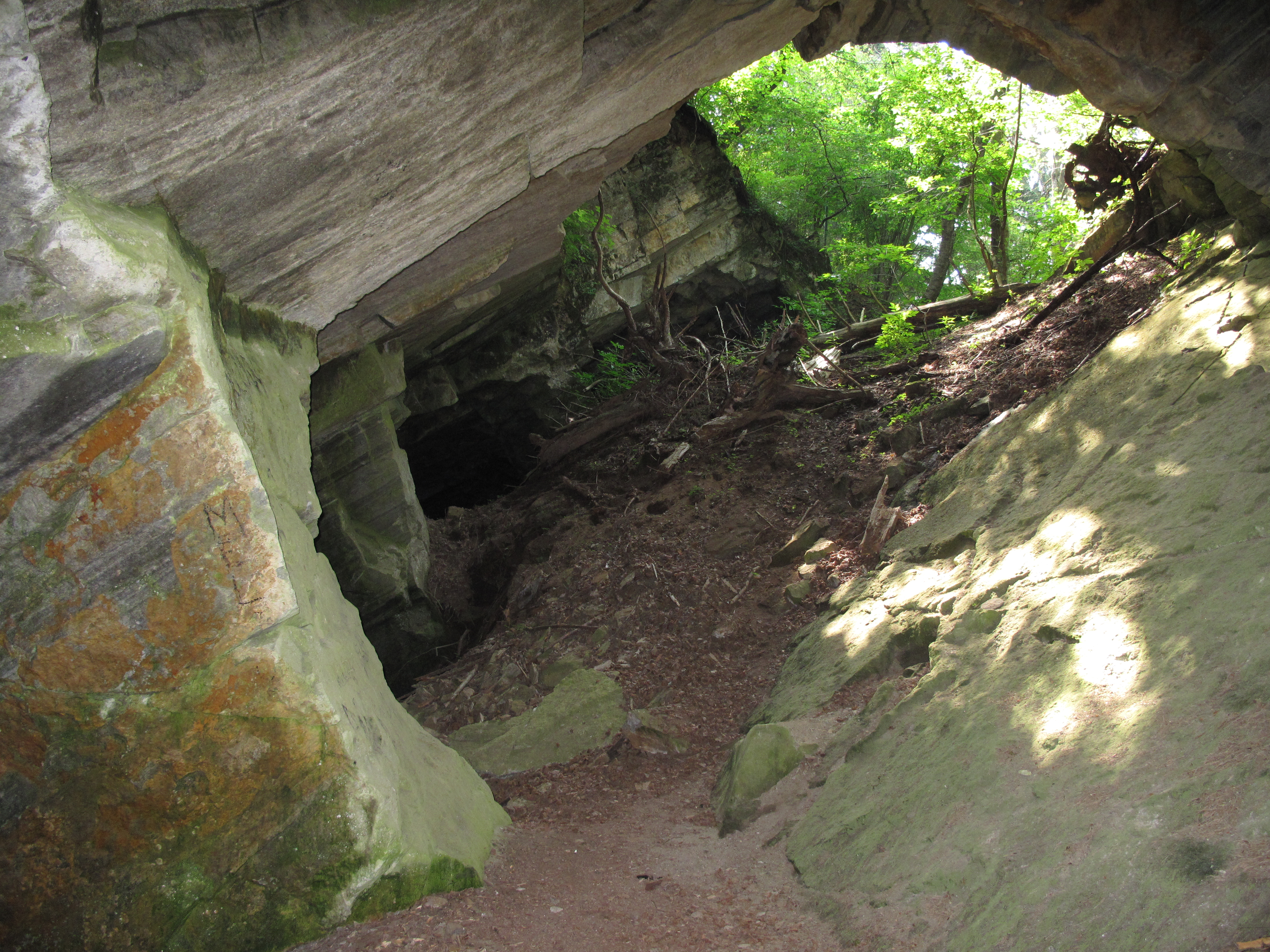 Přírodní památky Muckovské vápencové lomy. Okres Český Krumlov, Česká republika.